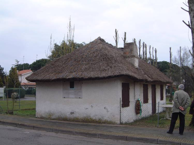 Casa di Anita Garibaldi a Comacchio. Je suis l'auteur de cette photo prise en Avril 2007 à "Lido delle Nazione" près de Comacchio (province de Ferrare) Italie.